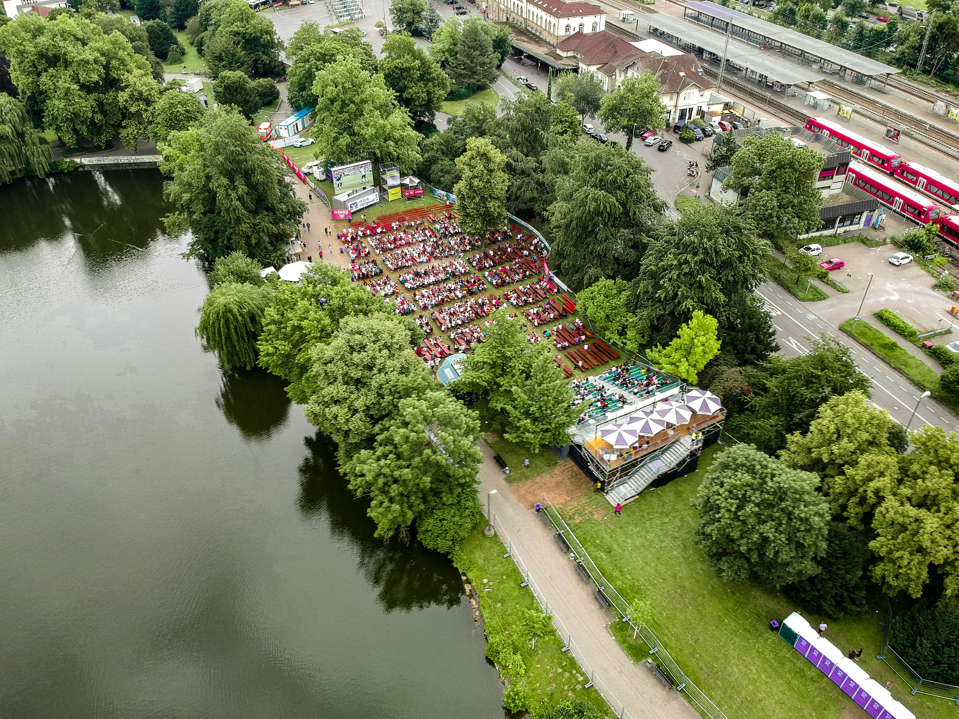 Tübingen. Pulblic-Viewing-Gelände im Anlagenpark während der Weltmeisterschaften.